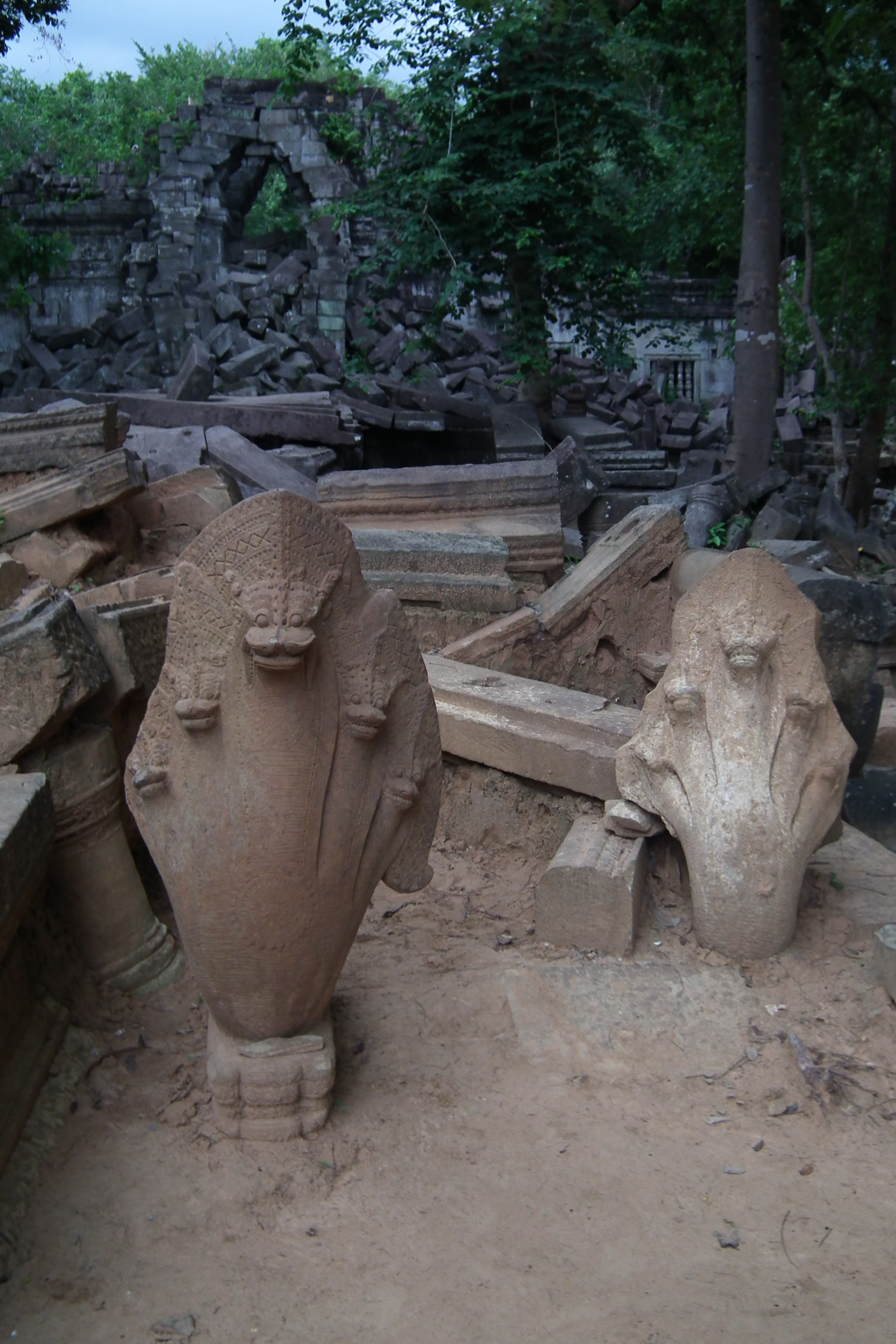 Beng Mealea-Restaurant ប្រាសាទបឹងមាលា ベンメリア アンコール遺跡群